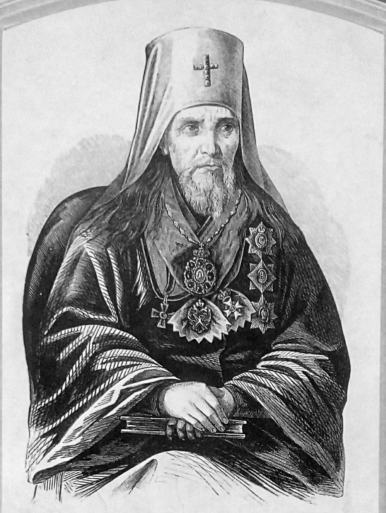 Григорий (Постников), митрополит Новгородский и Санкт-Петербургский († 1860 г.)